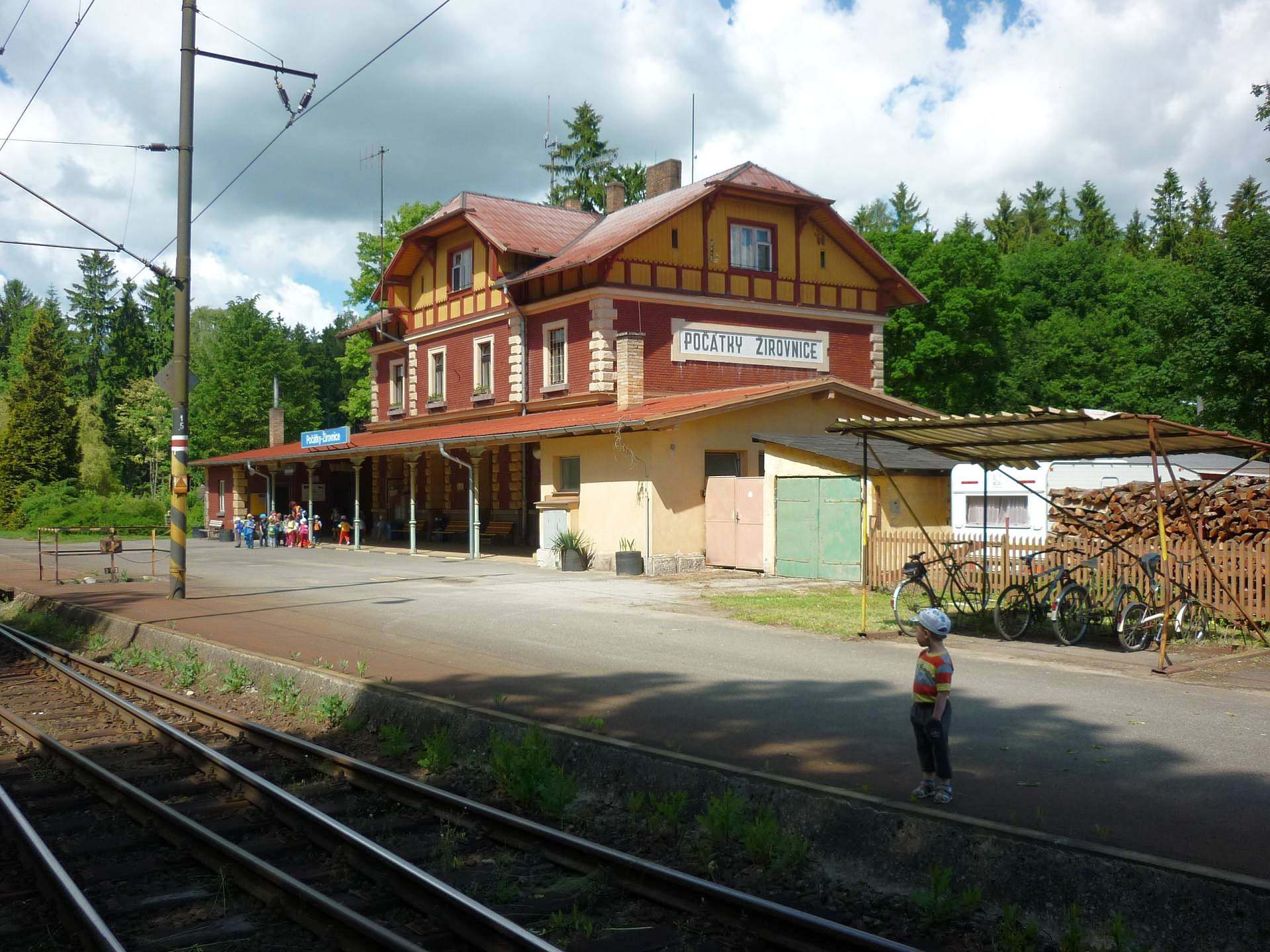 Železniční stanice Počátky - Žirovnice na trati 225